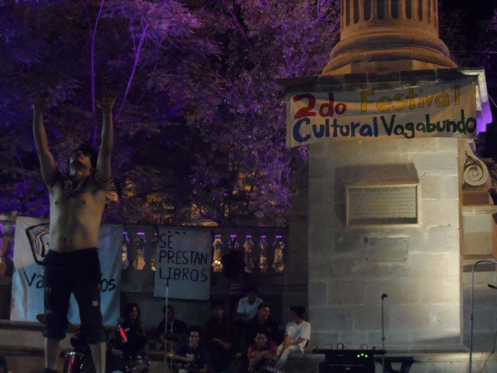 2do Festival Vagabundo